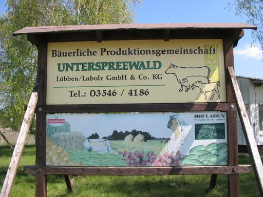 Spreewald, Schild bäuerliche Produktionsgemeinschaft in Lubolz